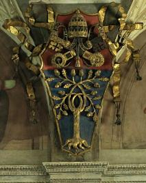 O Brasão do Papa Júlio II na Capela Sistina, de Michelangelo. Acima da porta principal da capela, onde entra o papa nas cerimônias. O brasão é encimado pelo profeta menor Zacarias, no qual Michelangelo pintou o rosto de Júlio II.